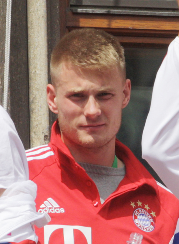 Der Fußballspieler Lukas Raeder während der Double-Feier des FC Bayern auf dem Münchner Rathaus-Balkon.